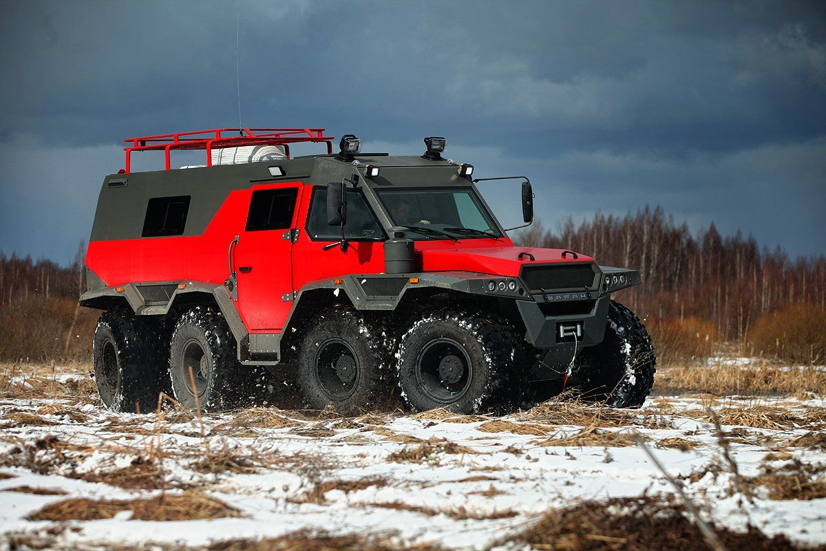 Шаман — вездеход-амфибия на шинах сверхнизкого давления, производится компанией "Авторос".